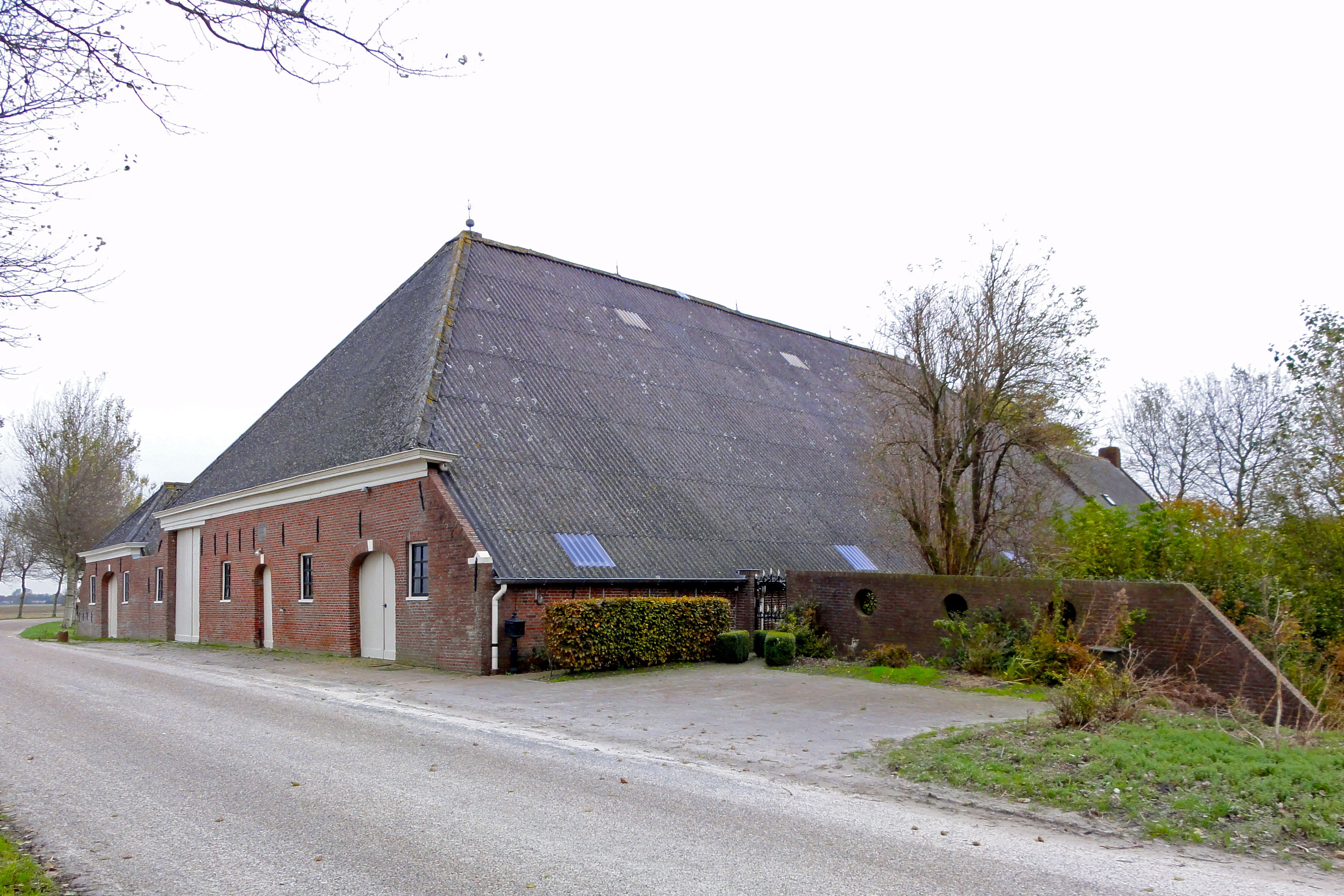 Wiemaheert aan de Zoutkamperweg 1 te Niekerk (de Marne)